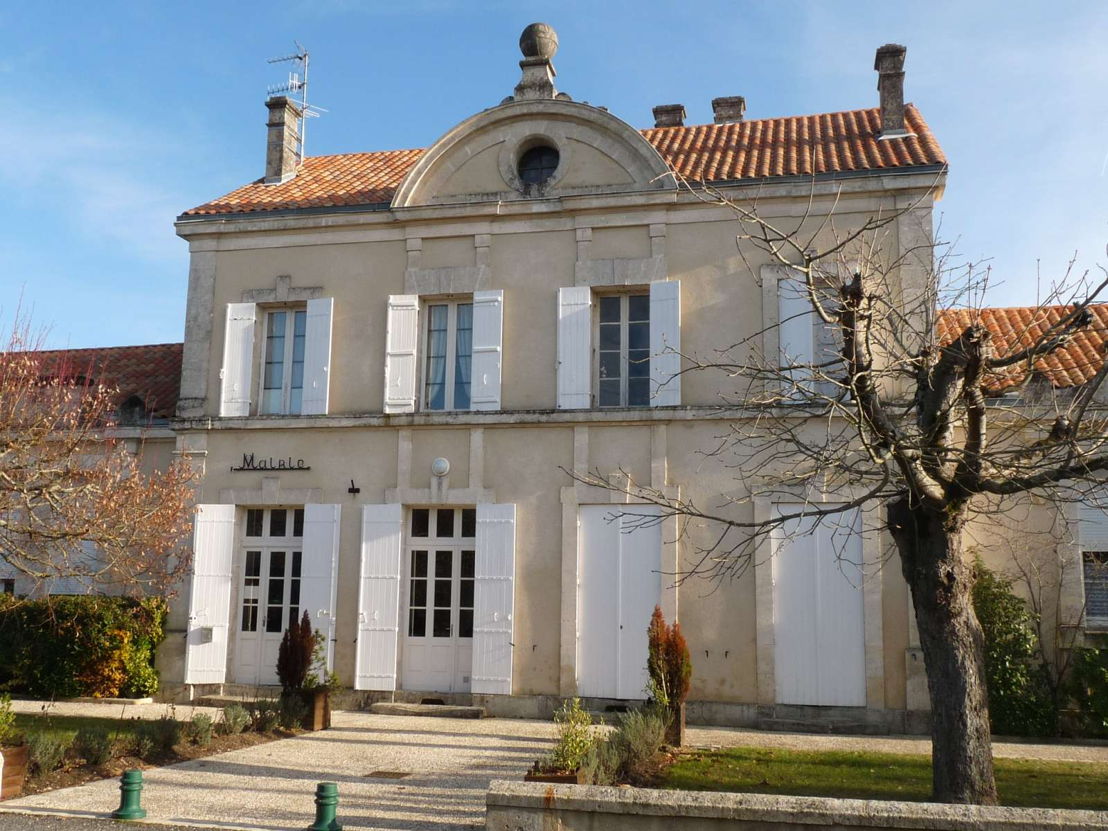 mairie de Festalemps, Dordogne, France